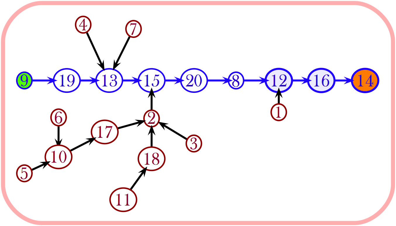 Bijection de Joyal et correspondance de Foata. Les sommets bleus sont les éléments cycliques de l'application (de [ [ 1 , n ] ] {\displaystyle [\![1,n]\!]} dans [ [ 1 , n ] ] {\displaystyle [\![1,n]\!]} ) sous-jacente. Les sommets verts et oranges sont les deux sommets marqués de l'arbre de Cayley. On peut voir le sommet orange, par exemple, comme la racine de l'arbre.